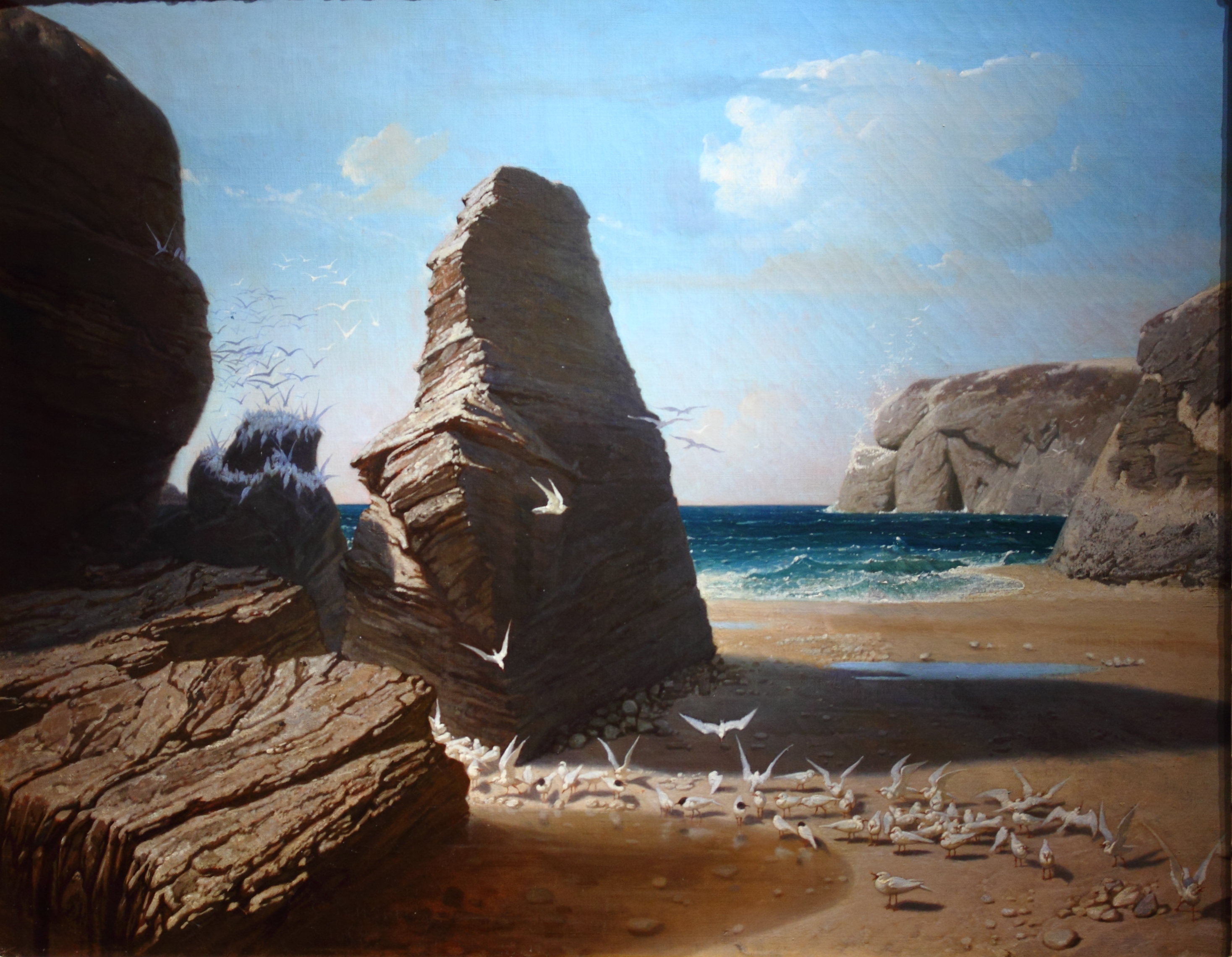 Ce tableau représente de manière précise la plage de Port-Donnant à Belle-île-en-Mer.